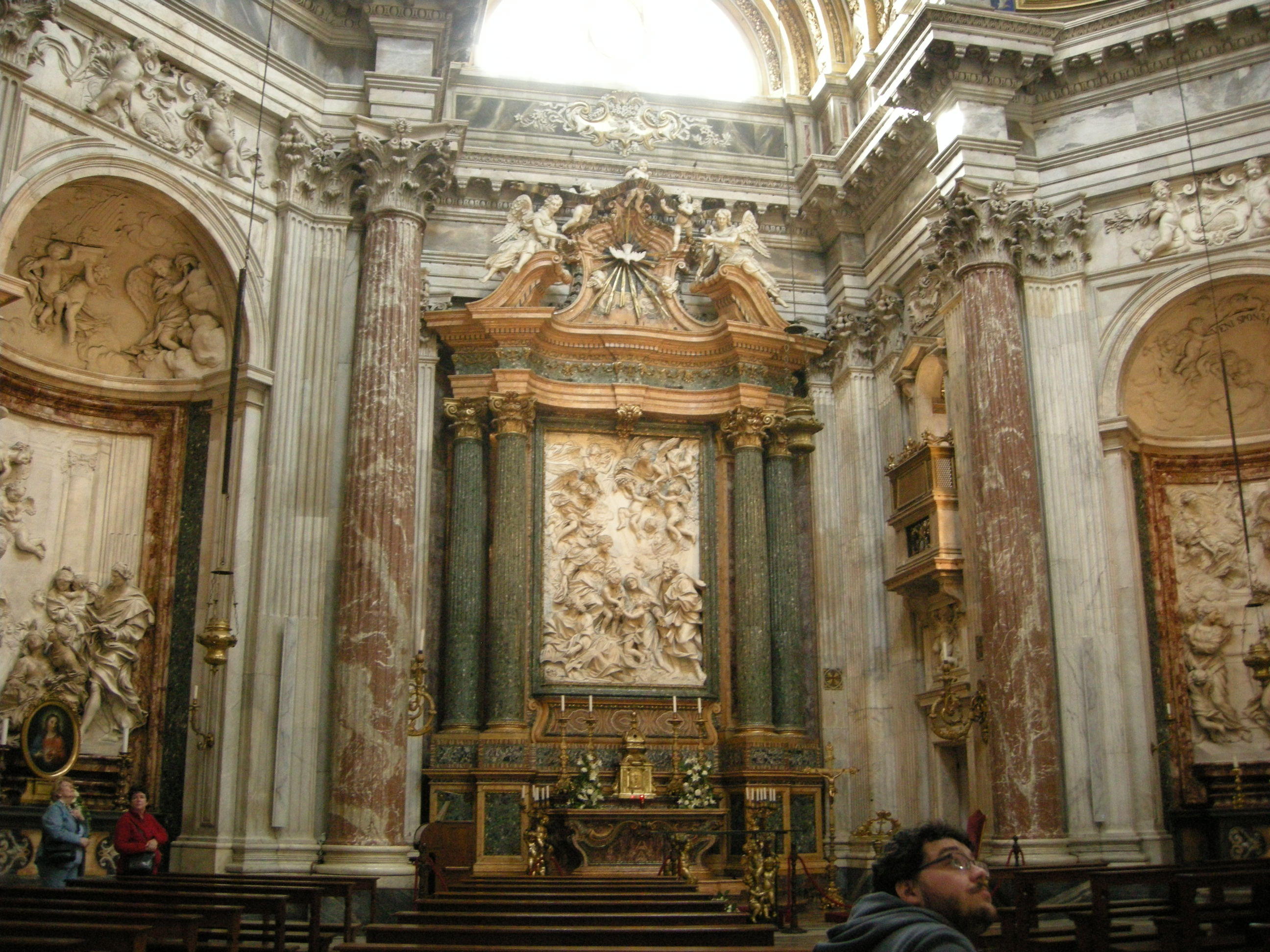 Sant'agnese in agone, interno